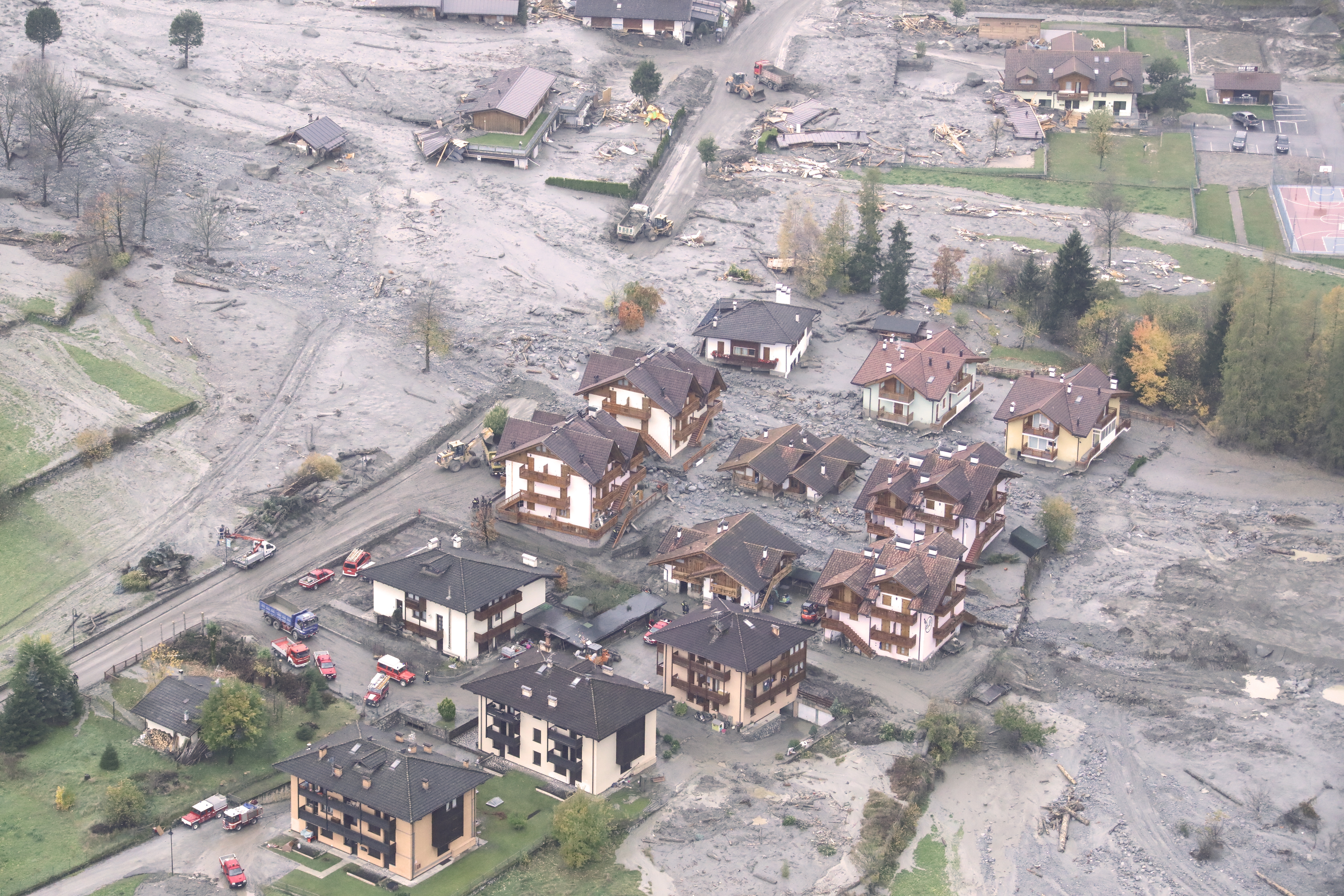 Trentino